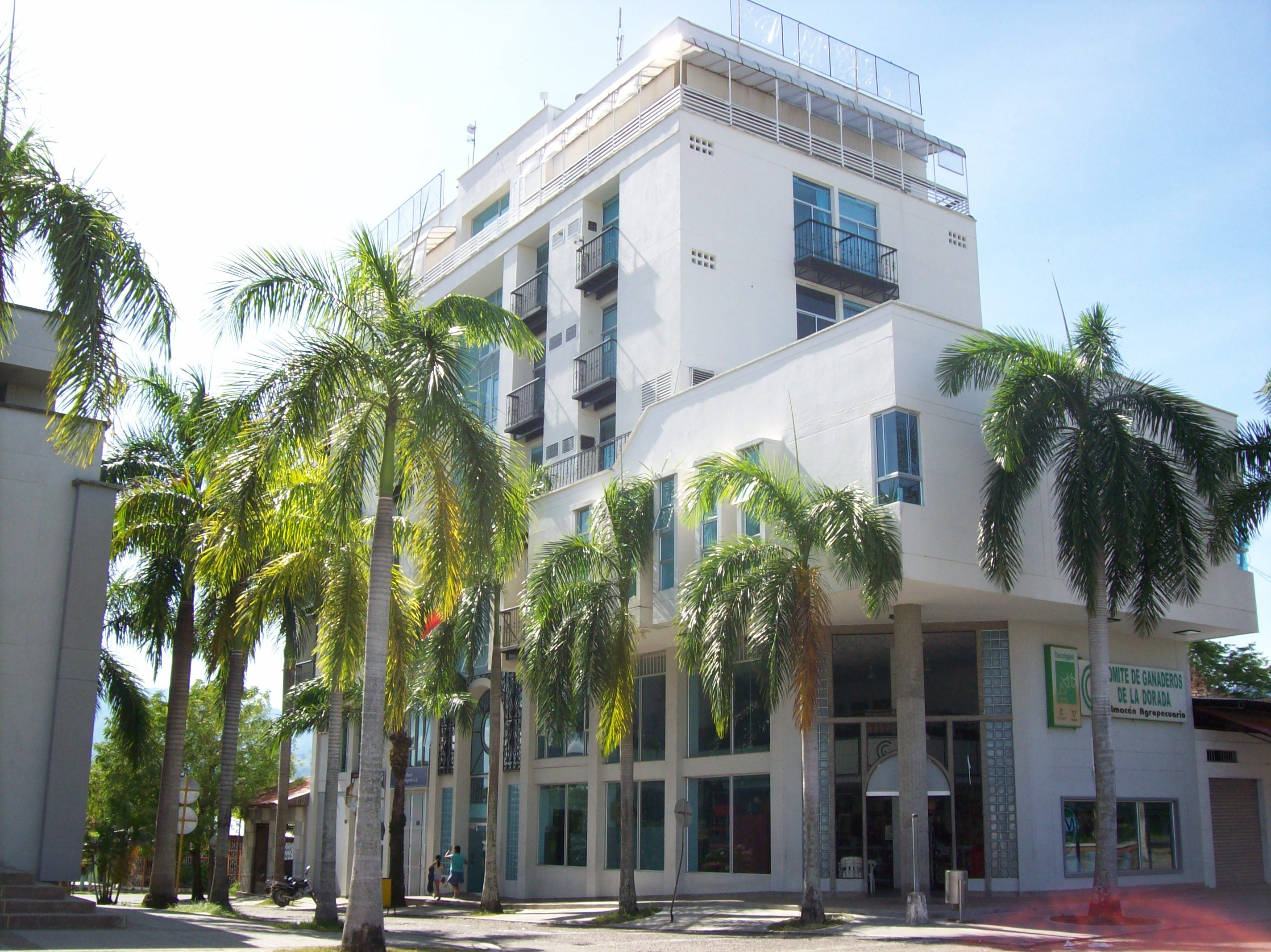 Exterior del Comité de Ganaderos, La Dorada.